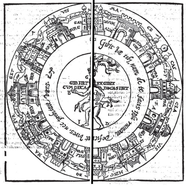 Imago Flandriae, Nicolas Bazel: Prognosticon nouum, anni huius calamitosissimi 1578. Cvm descriptione Cometae visi 14 Noembris anni elapsi, Autore D. Nicolao Bazelio, Bergensium S. Guinochi Medico Chirurgo, Antwerpen: Henricus Henricius 1578